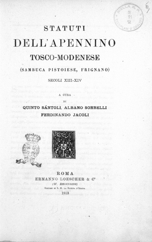 Frontespizio